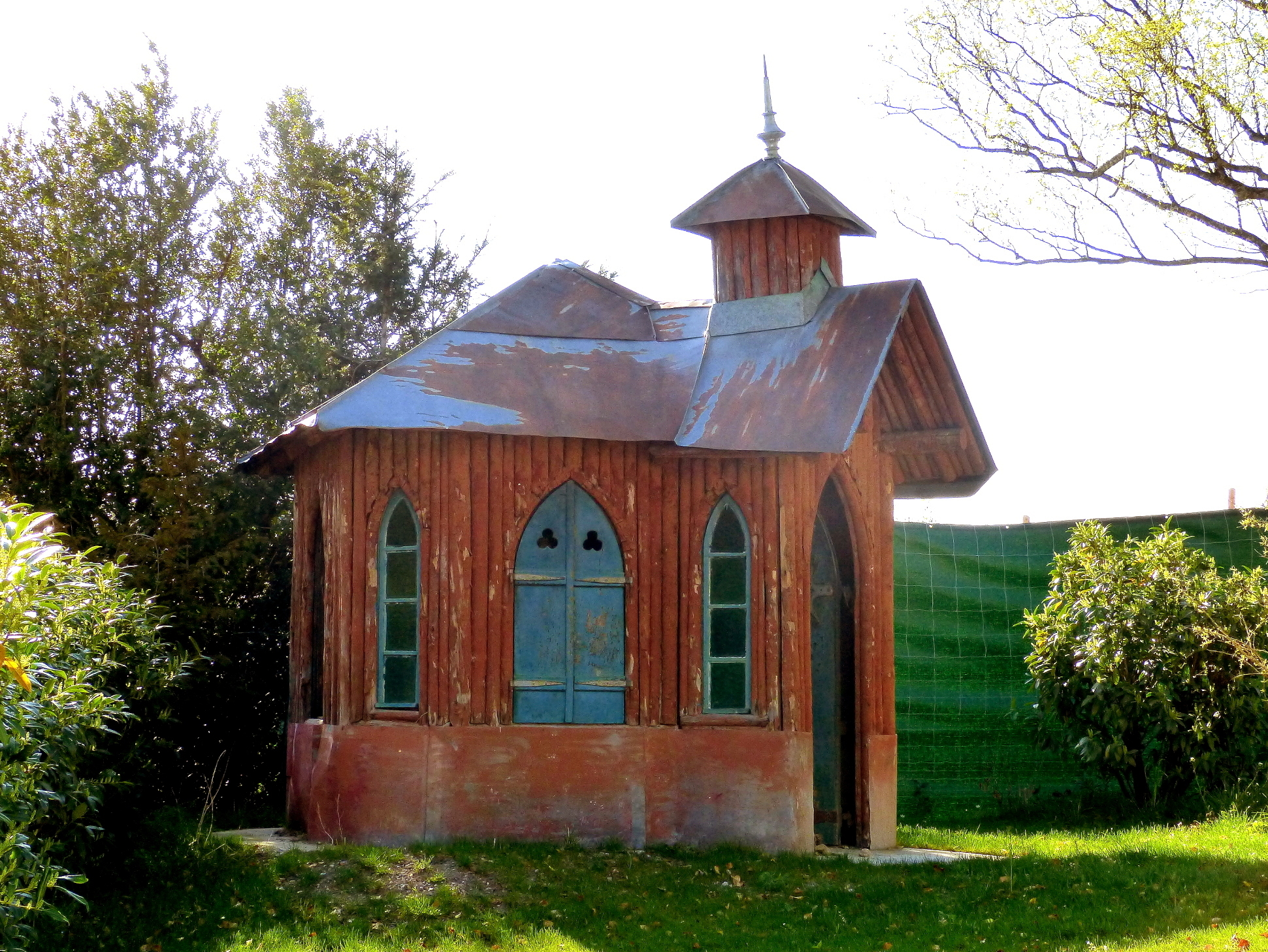 Berg am Starnberger See, OT Allmannshausen, Zieglerweg 14. Das Gartenhaus in Form einer kleinen neugotischen Kapelle mit Dachreiter und Astdekor stammt aus der Zeit um 1890/1900.